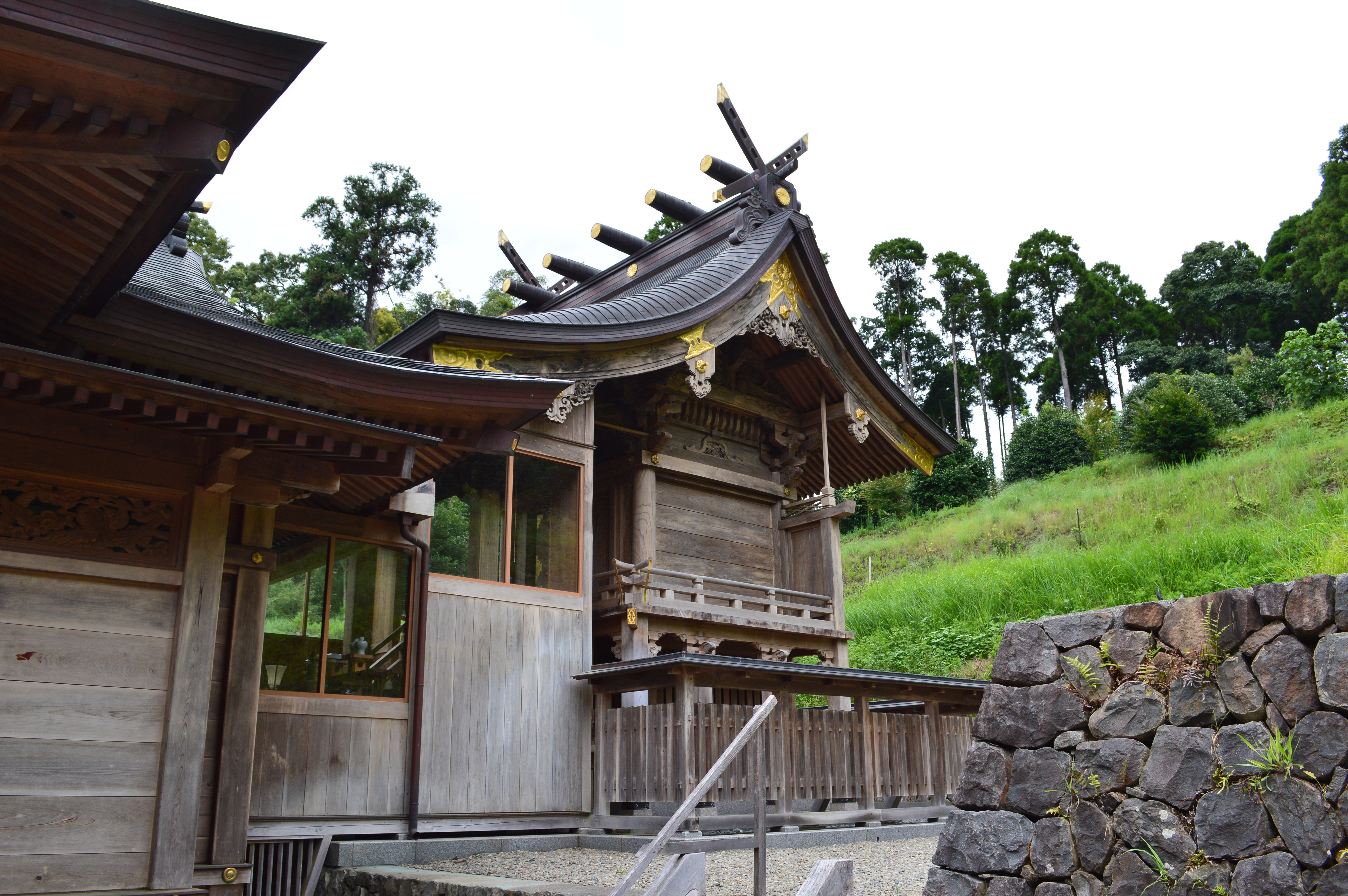 都農神社 本殿